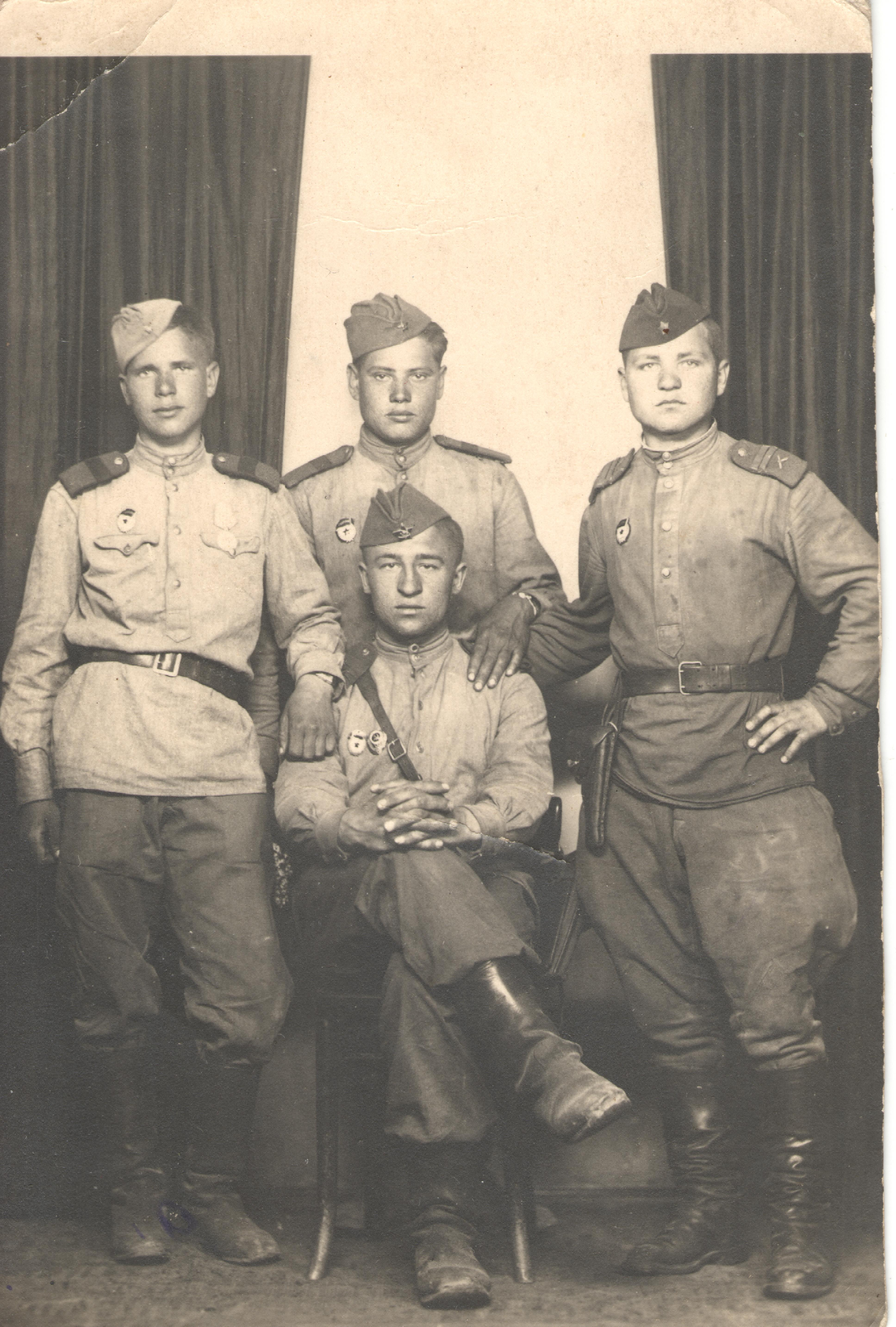 военное фото 1945г.